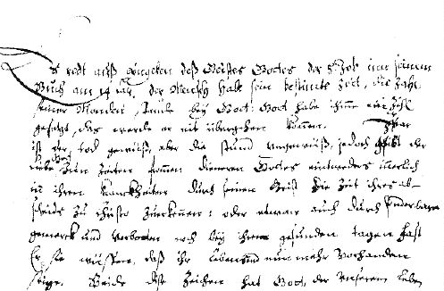 Pfarrer Hans Rudolf Tschudi (1641-1716) beschreibt im Jahre 1671 im Kirchenbuch von Wartau-Gretschins, Kanton St. Gallen, Schweiz, den Tod seines Vaters Pfarrer Herkules Tschudi (1602-1671).